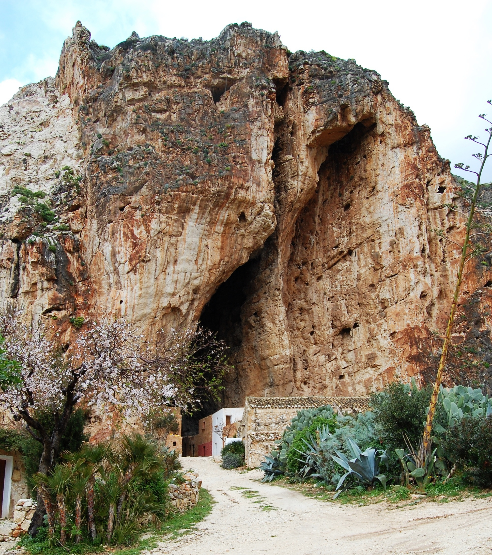 Riserva naturale Monte Cofano, Sicily Grotta Mangiapane a Scurati